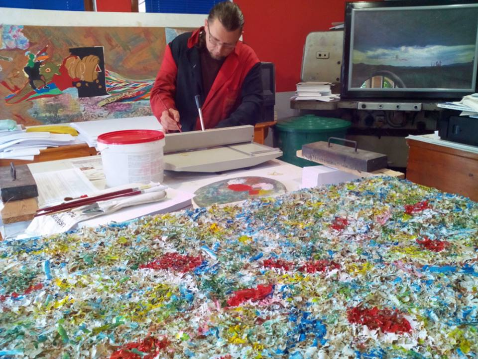 Бранислав Лукић Лука у атељу ради на циклусу "Театар демократије".